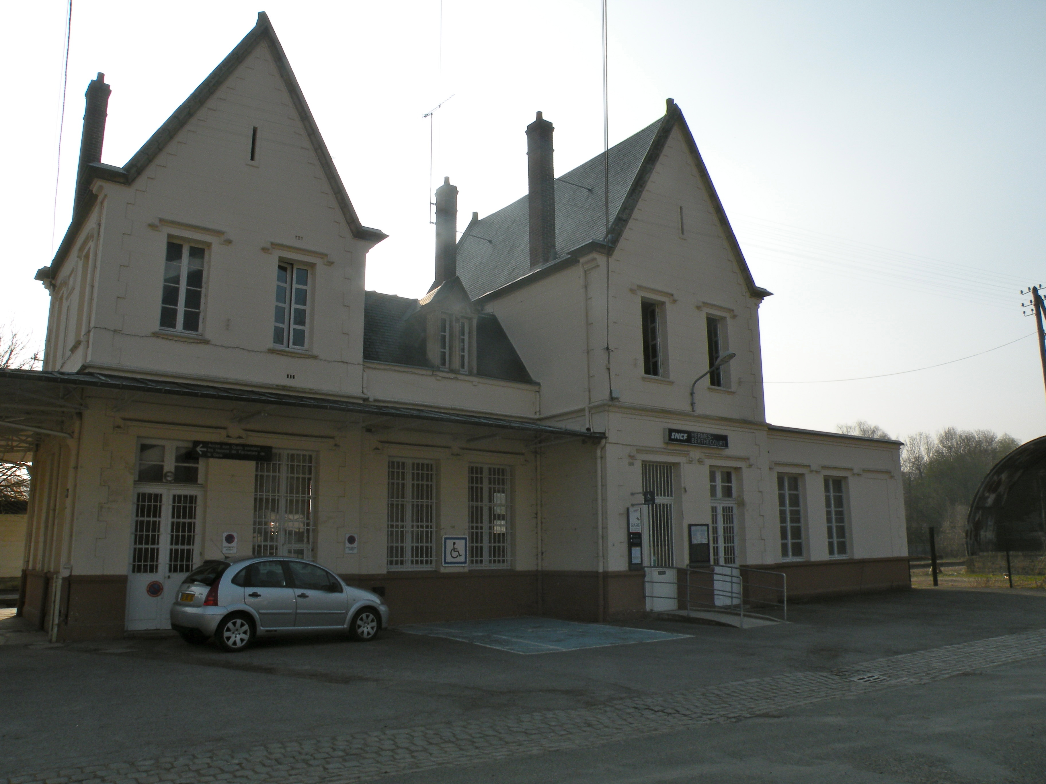 Façade avant de la gare de Hermes (Oise)